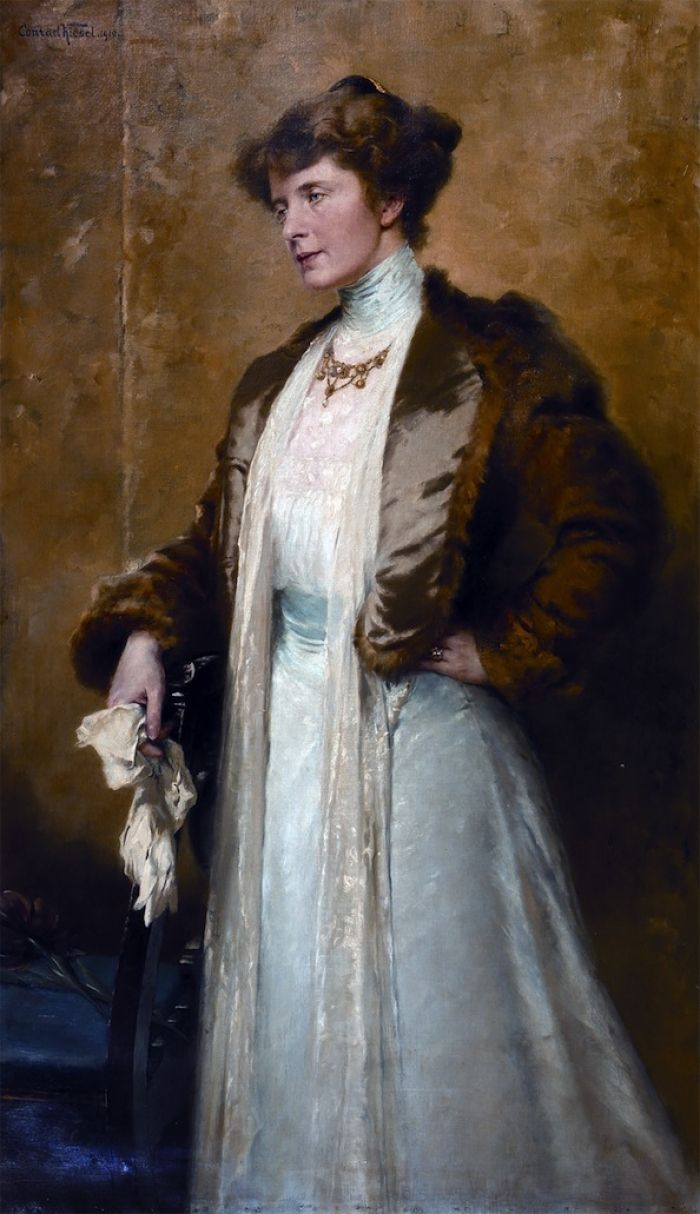 Conrad Kiesel: Portrait der Schriftstellerin Emmi Lewald, 1909